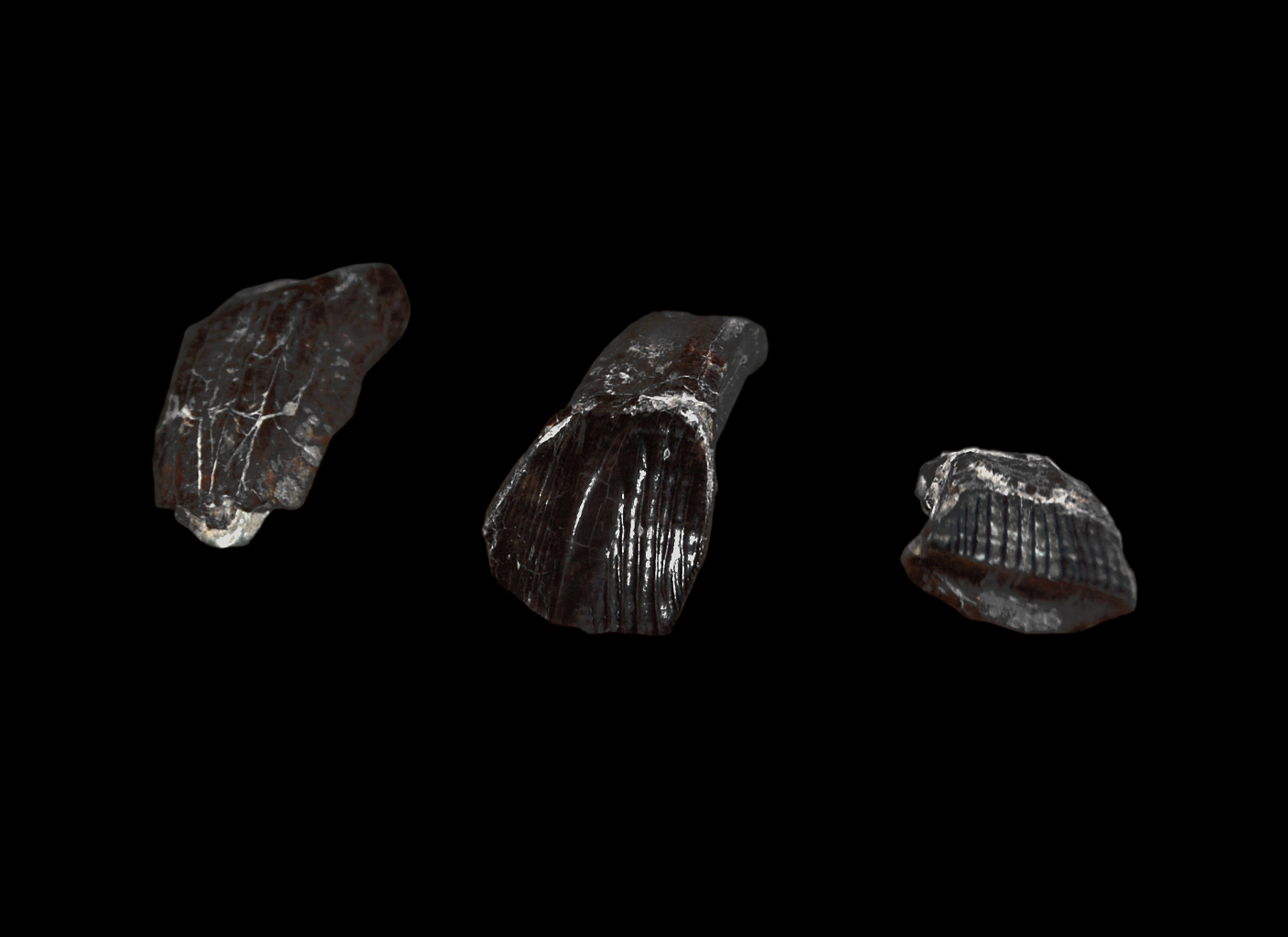 Babes Bolyai paleontology museum